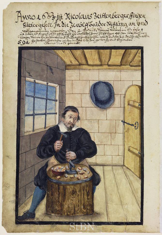 Nicolaus (Nikolaus; Nicolaus) Zeittenberger (Zeitenberger), Fingerhuetergesell (Fingerhuter; Fingerhutmacher) Transkription und weitere Informationen